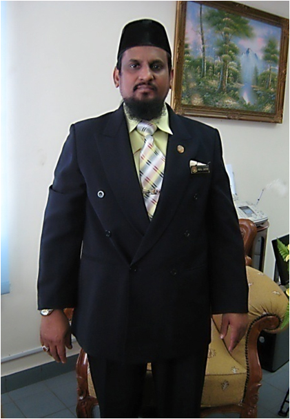 Tuan Haji Abdul Gaffar bin Kunchi Mohd. Sekolah Menengah Kebangsaan Bandar Baru Ampang (SMKBBA).